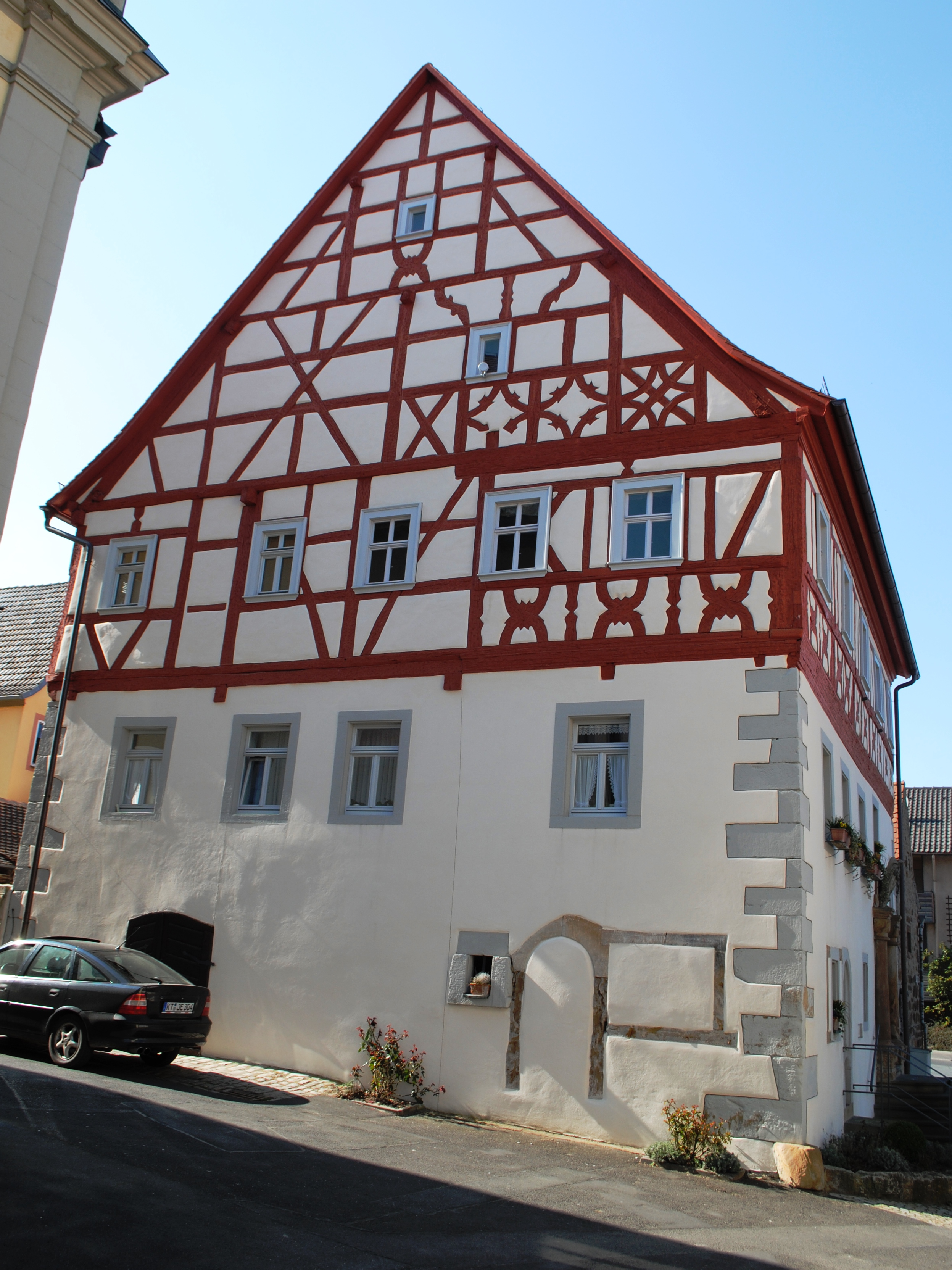 Rathaus, Südosten, Prichsenstadt-Stadelschwarzach